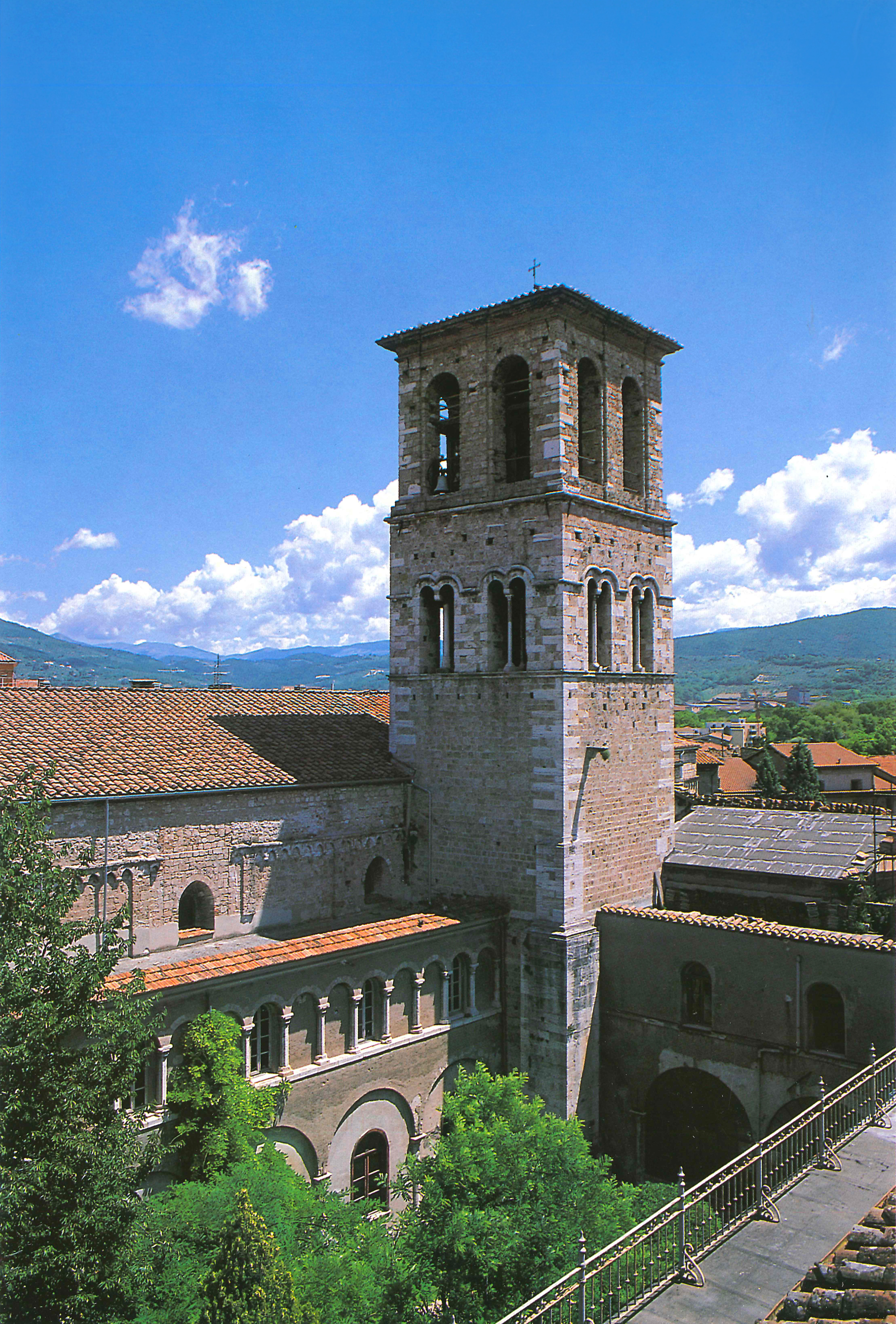 Campanile della chiesa di San Pietro (seconda metà del XIII secolo, Terni)